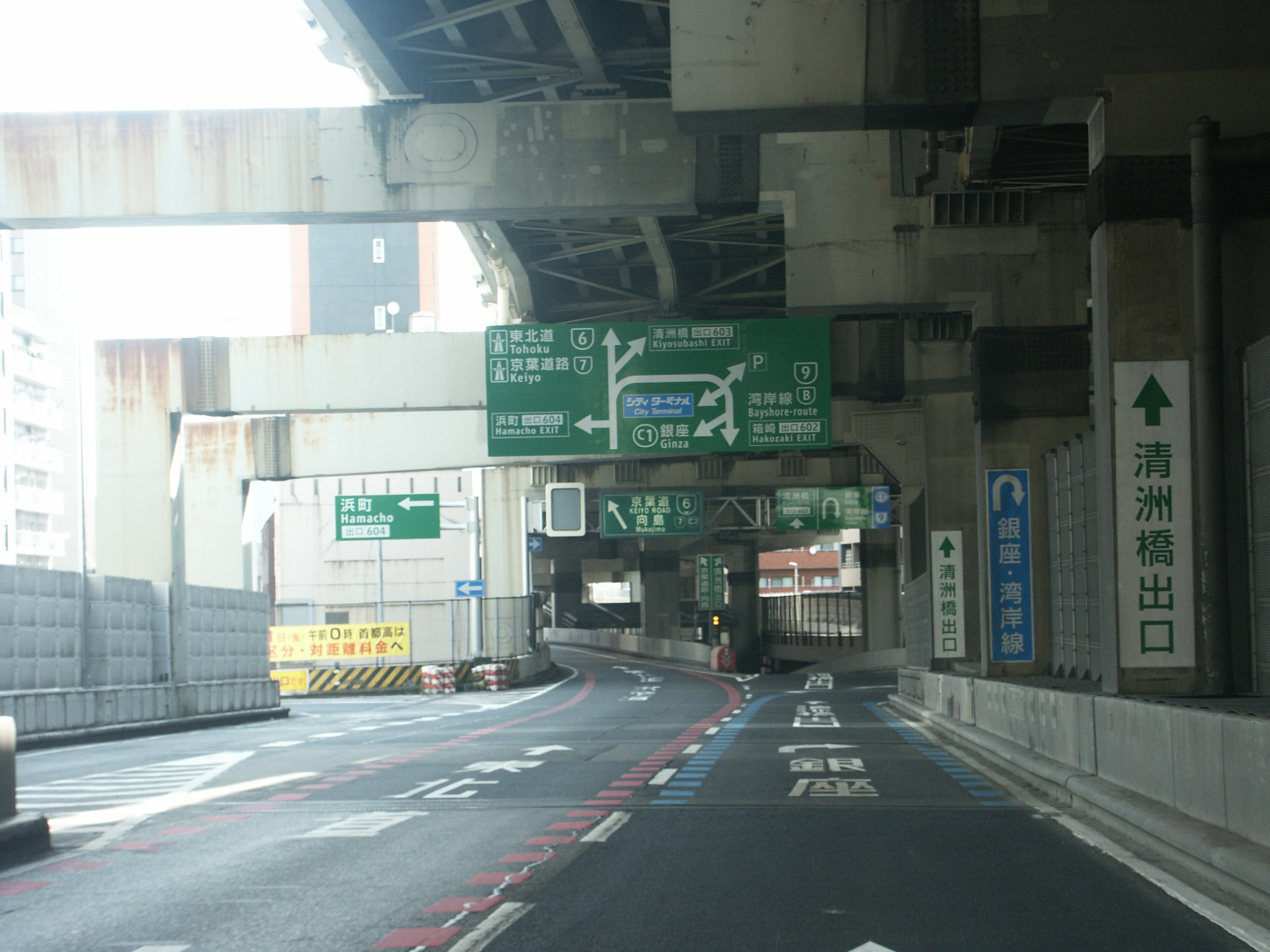 首都高速道路浜町出口と清洲橋出口（箱崎ロータリー内分流付近）